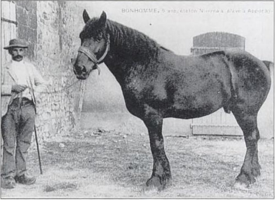 Un étalon nivernais de 5 ans, Bonhomme, sur une carte postale datée du 14 mars 1919